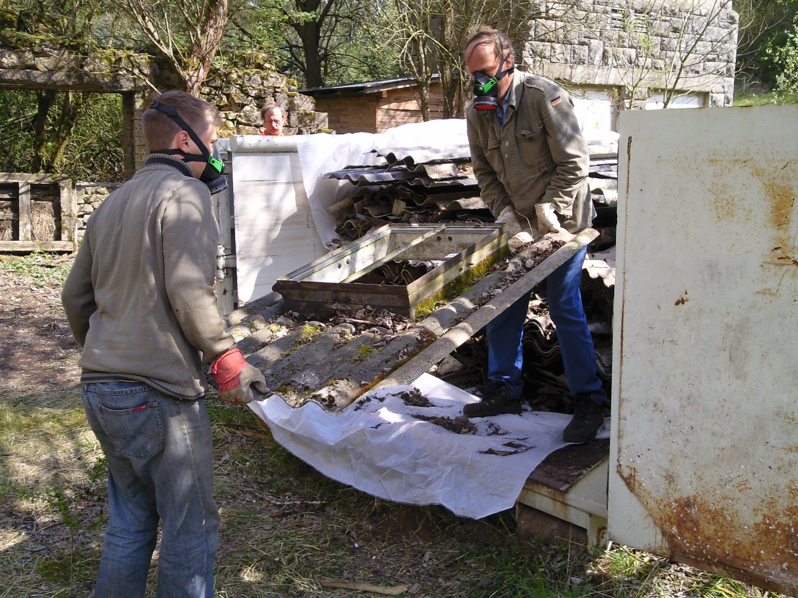 Einladen von Asbestzement-Dachwellplatten in Bigpack in einen Rollcontainer im Naturschutzgebiet Wulsenberg, Marsberg, NRW, Deutschland.